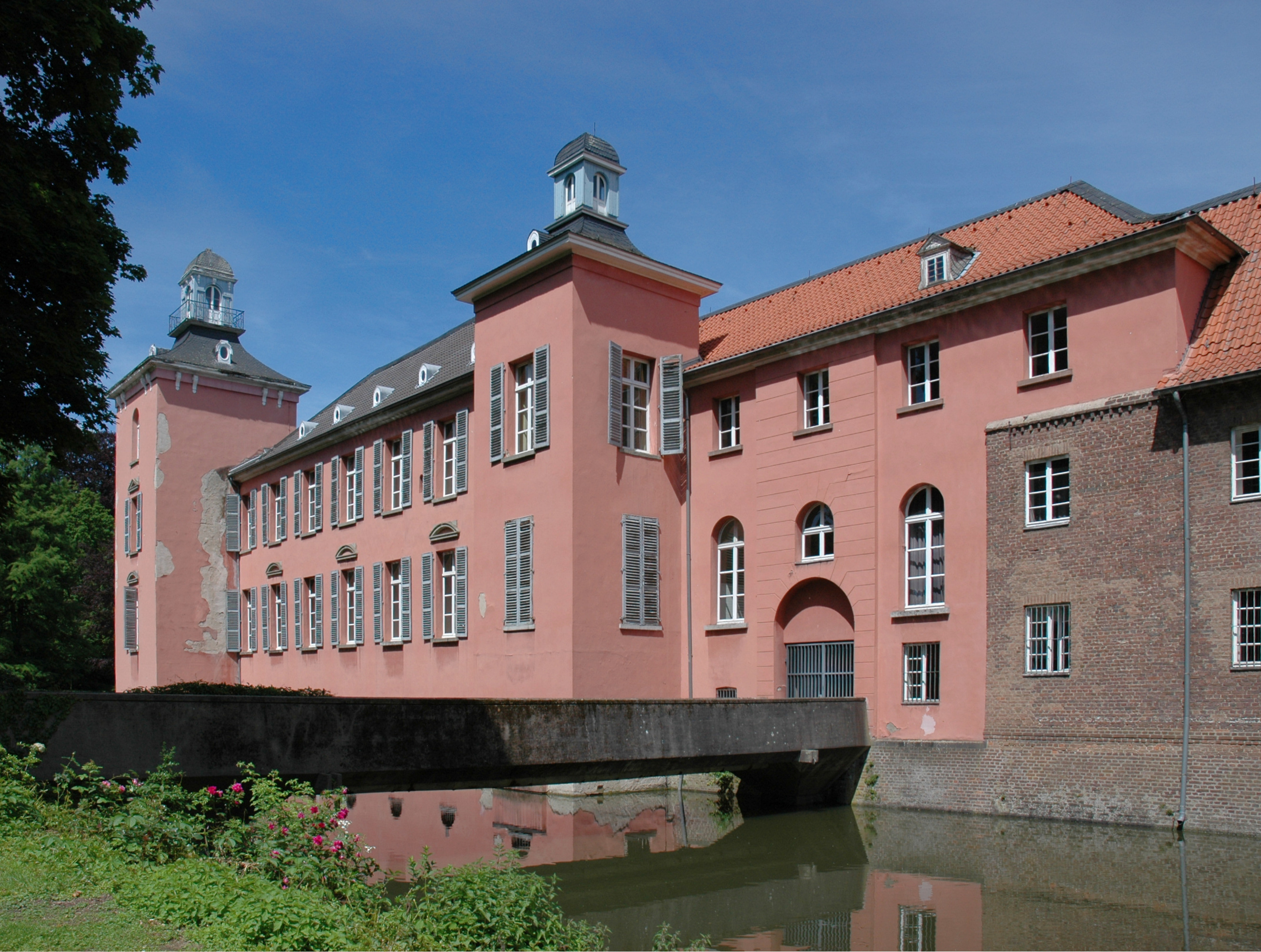 Schloss Kalkum, Herrenhaus und Küchenbau